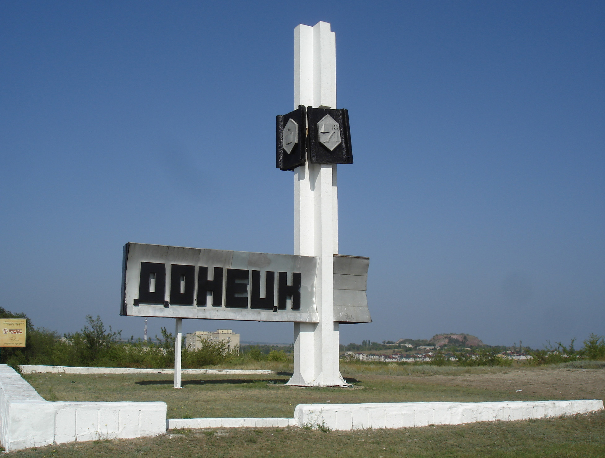 Стела на въезде перед Донецком